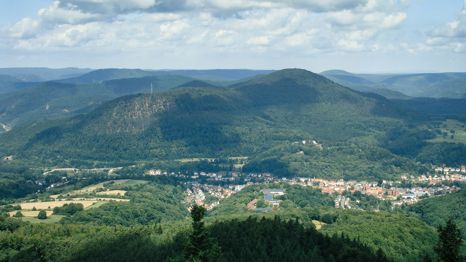 Kleiner Adelberg (links, 484 m) und Großer Adelberg (rechts, 567m) im Wasgau/Pfälzerwald, im Vordergrund Queichtal mit Annweiler - Blick vom Rehbergturm